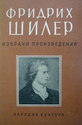 Фридрих Шилер, Избрани произведения, Т. I Драми (Дон Карлос, Вилхелм Тел - в стихове). „Народна култура“, 1955 - превод Димитър Стоевски